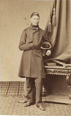 Frédéric d'Otreppe âgé